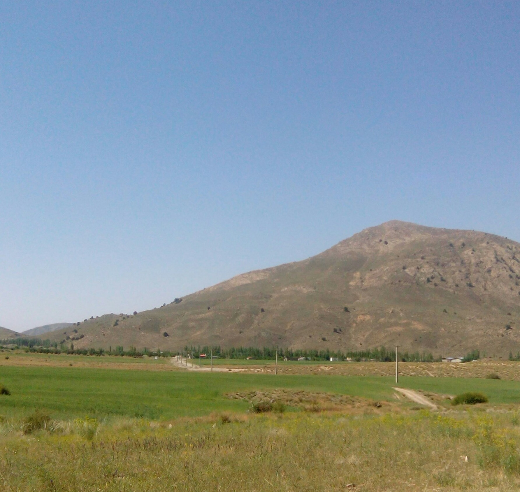 این تصویر مربوط به دورنمایی از روستای صاحب آباد سربیژن میباشد.که بوسیلهٔ خودم عکاسی شده است.